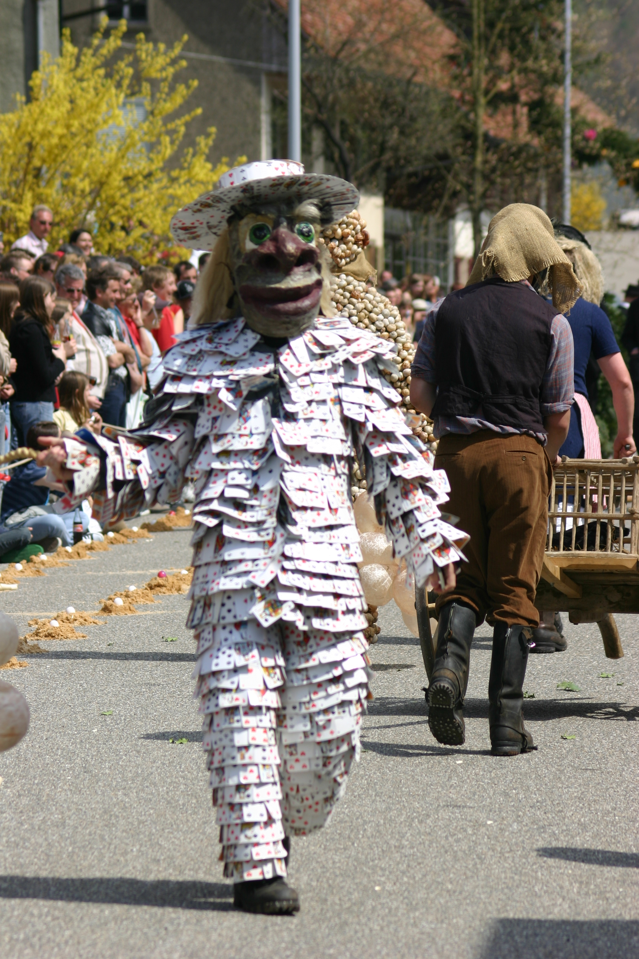 Jasschärtler auf Strasse